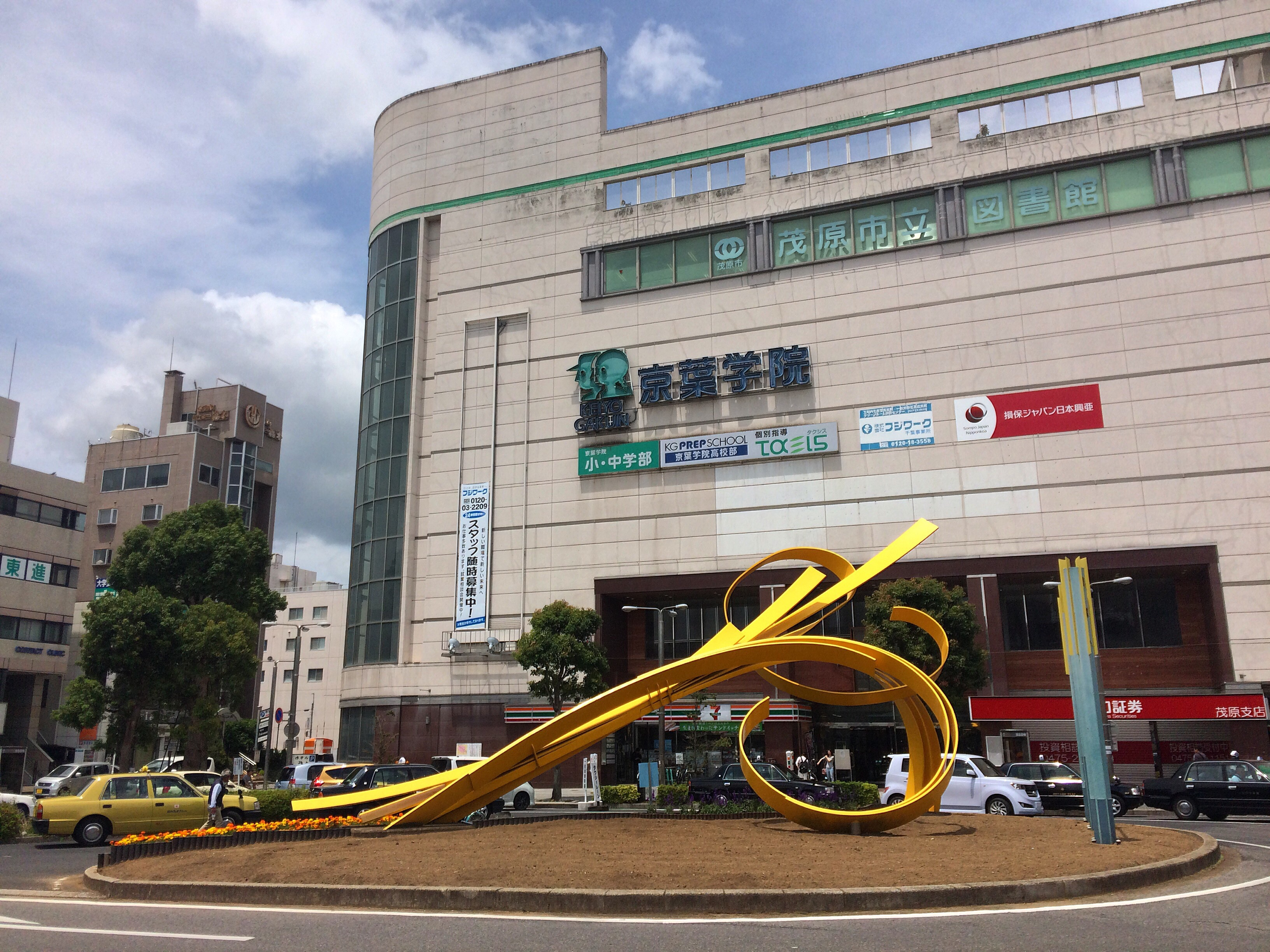 茂原駅南口モニュメント